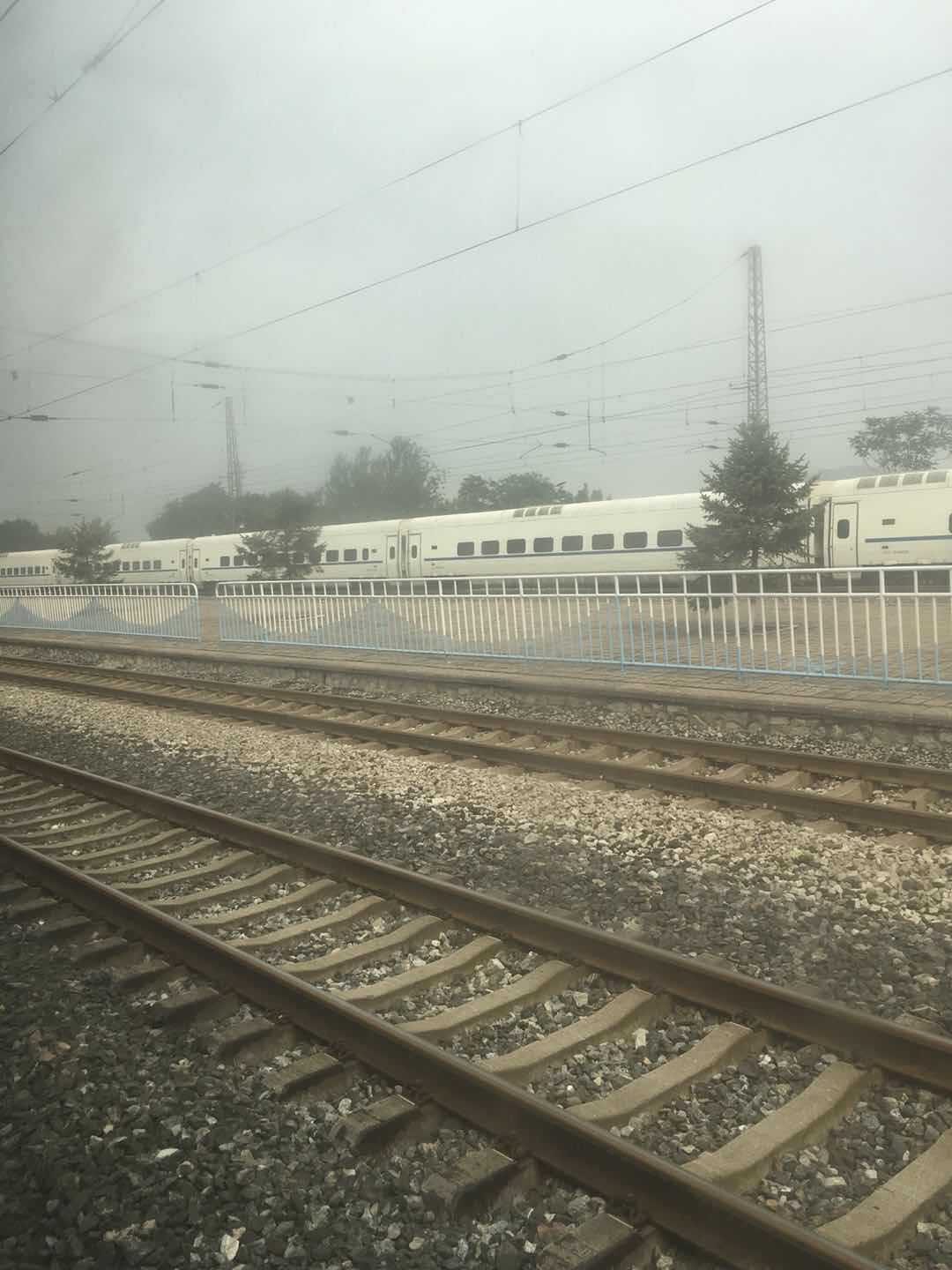 滦县站站内的铁轨与站台，对面为动车组列车。（摄于K498次列车上，2017年8月）